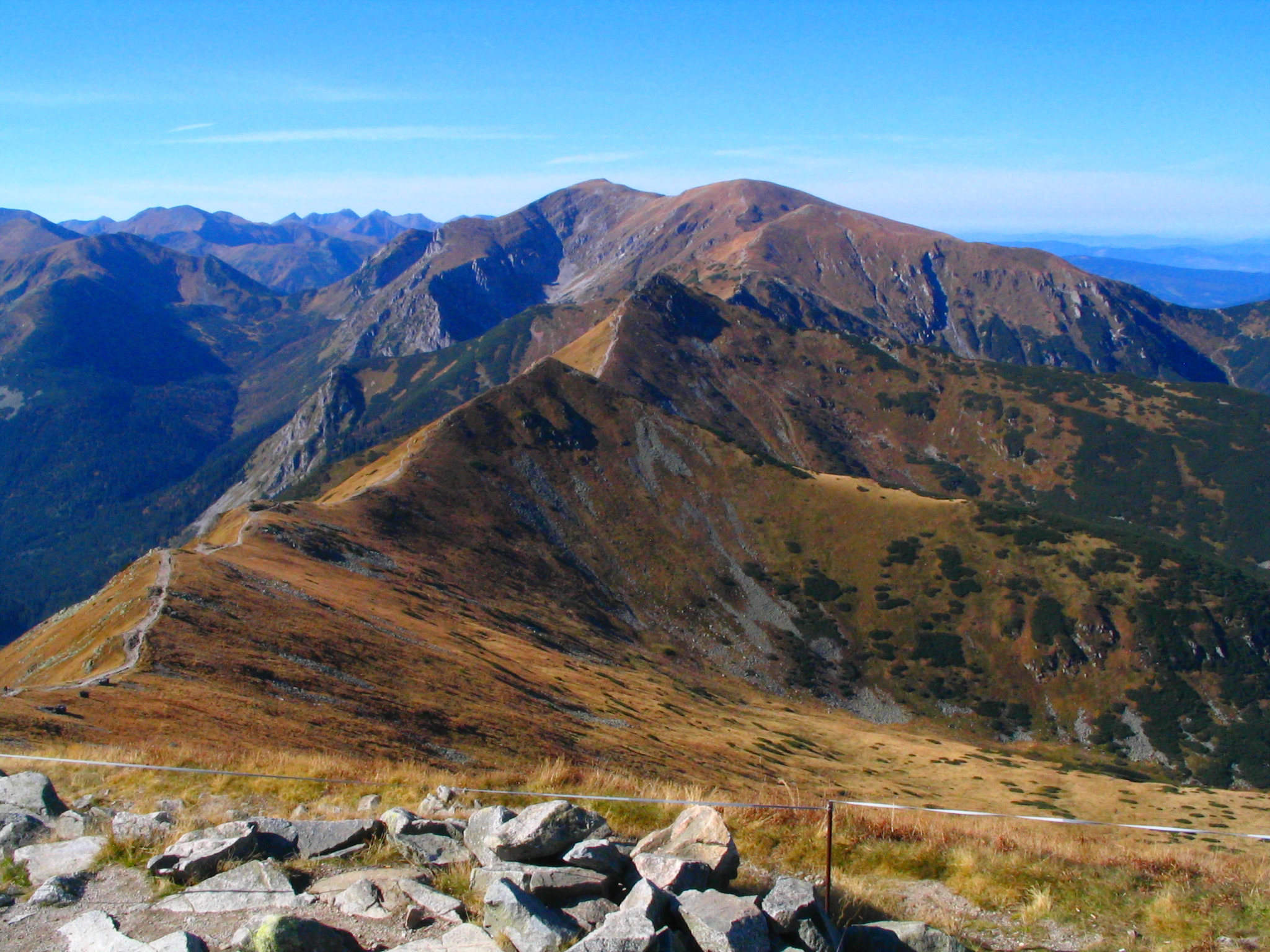 Kuźnice-Kasprowy Wierch-Beskid-Liliowe-Hala Gąsienicowa-Boczań-Kuźnice 10